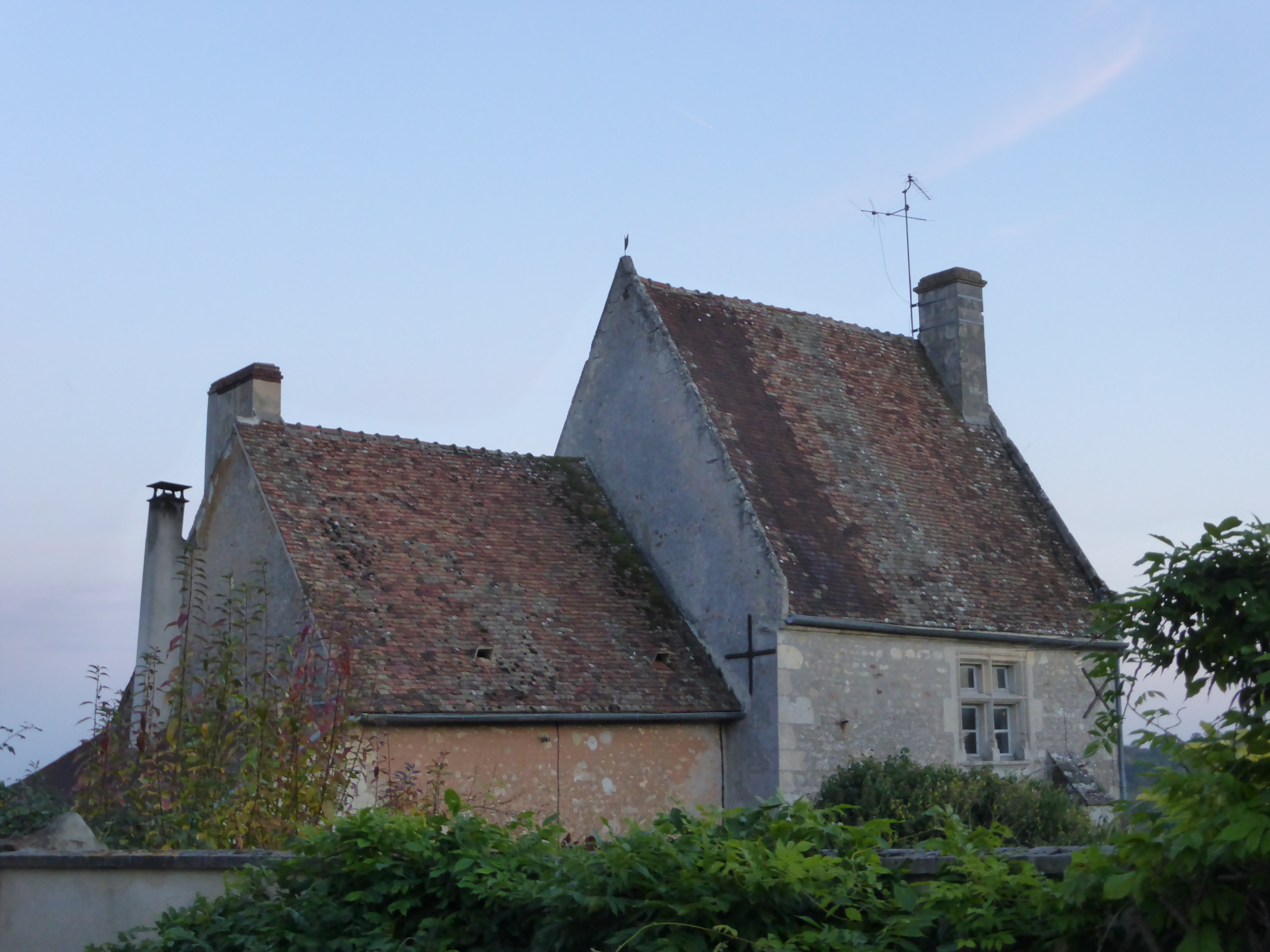 Manoir à Bellou-le-Trichard, dans l'Orne. Le manoir est situé juste derrière l'église.